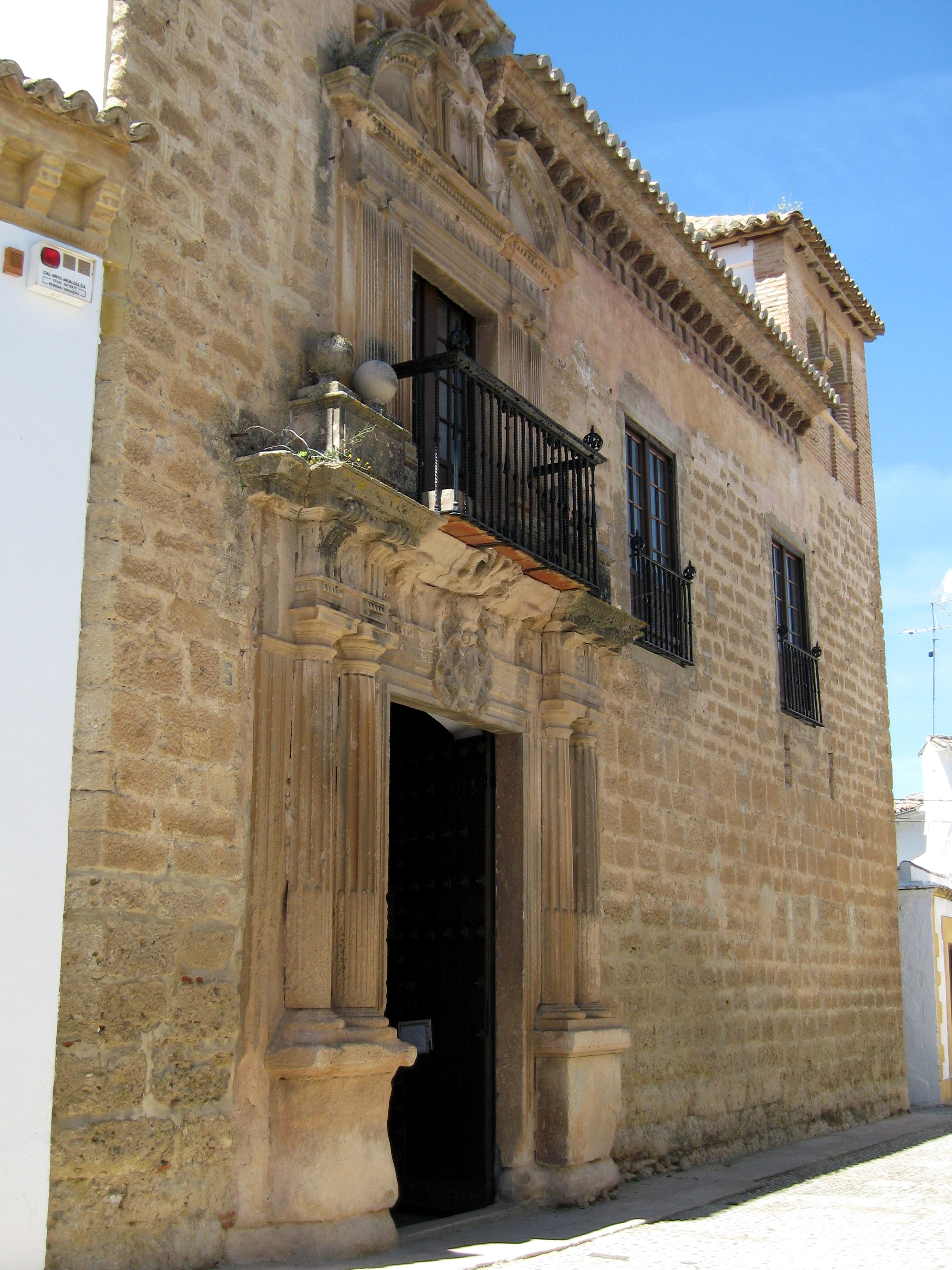 Stadtmuseum von Ronda in der Altstadt (La Ciudad), Provinz Málaga, Andalusien, Spanien